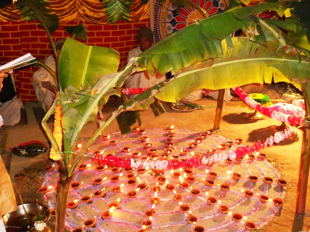 Choklong